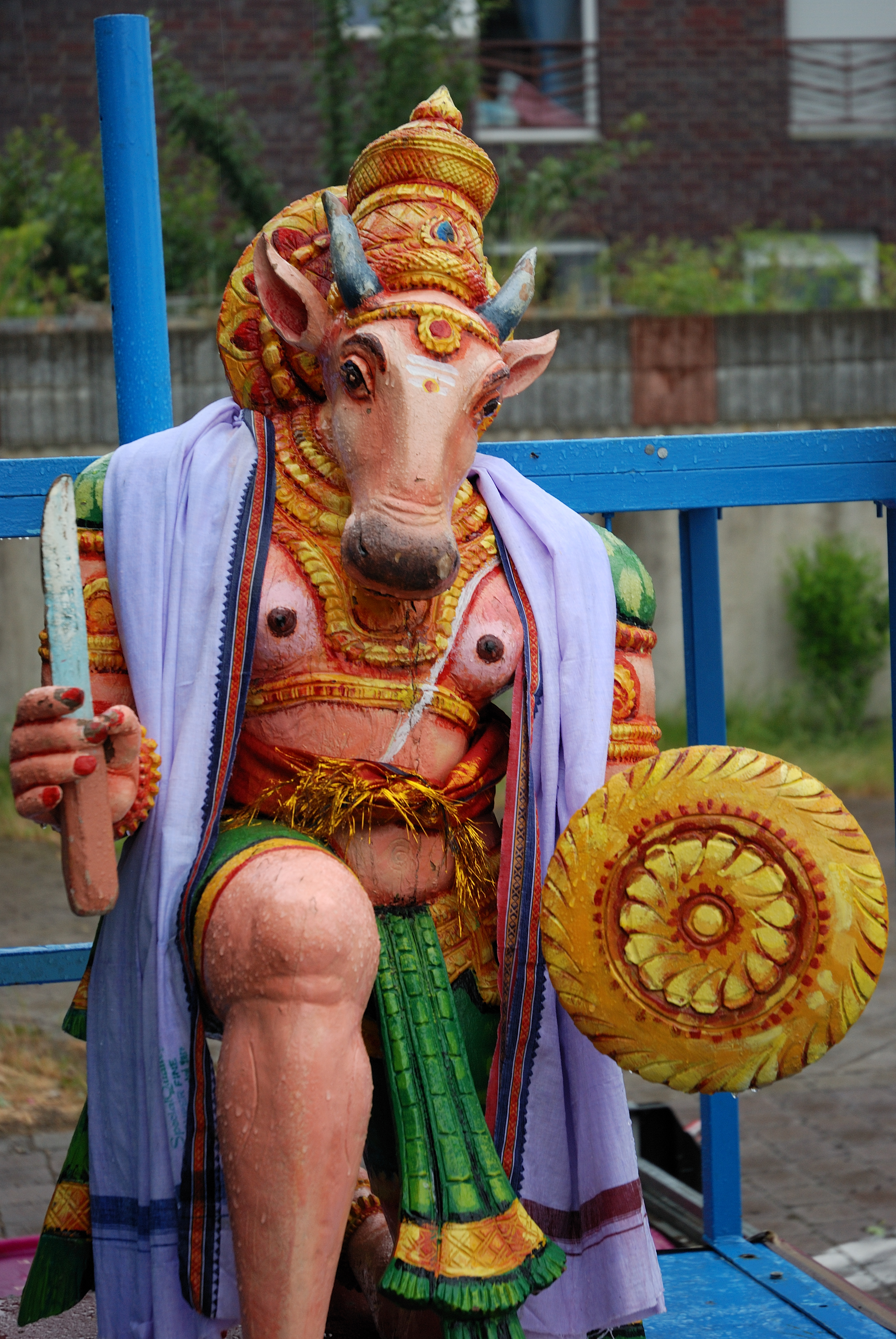 Hindutempel in Hamm Nandi, der Stier des Gottes Shiva, hier in seiner Form als Mann-Bulle Nandikeshvara.